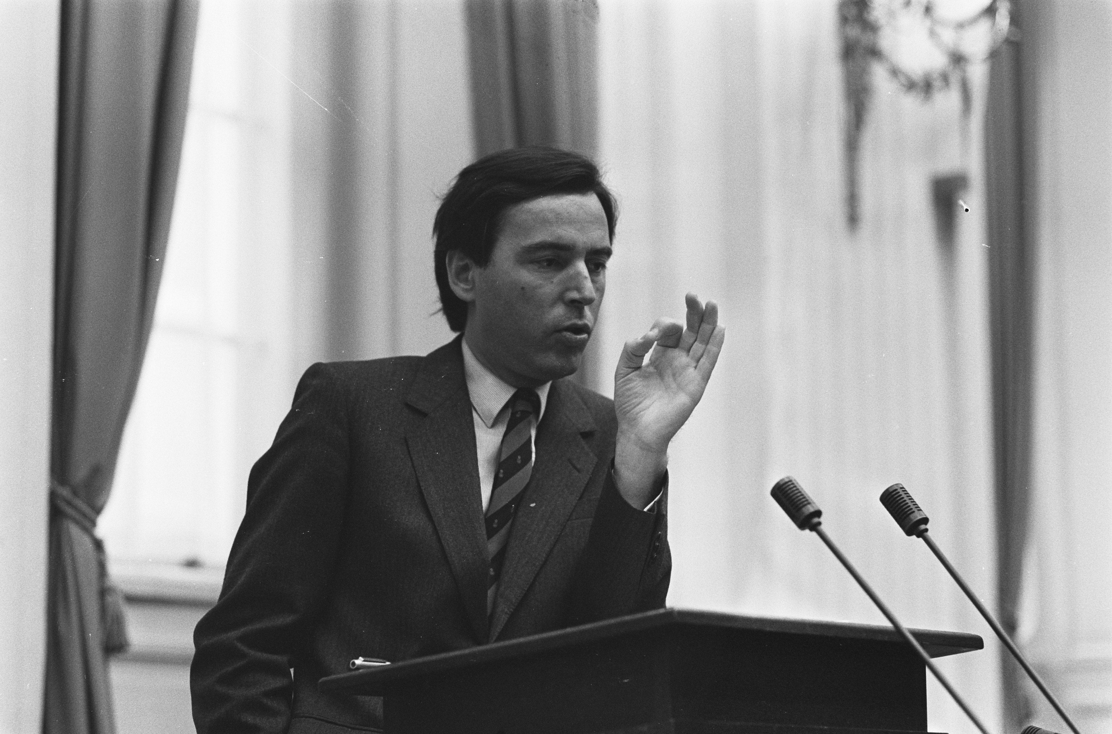 Collectie / Archief : Fotocollectie Anefo Reportage / Serie : [ onbekend ] Beschrijving : Tweede Kamer : mediadebat; minister Brinkman tijdens antwoord aan kamer Datum : 3 september 1986 Trefwoorden : politiek Persoonsnaam : Brinkman, Elco Fotograaf : Fotograaf Onbekend / Anefo Auteursrechthebbende : Nationaal Archief Materiaalsoort : Negatief (zwart/wit) Nummer archiefinventaris : bekijk toegang 2.24.01.05 Bestanddeelnummer : 933-7474